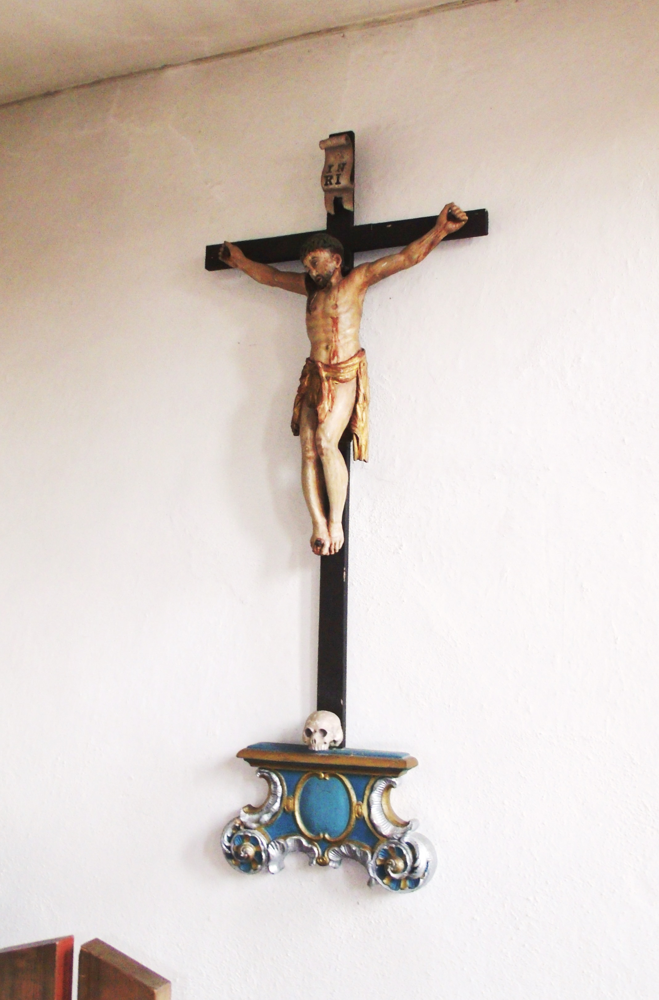 Colmberg, St. Ursula, Kruzifix